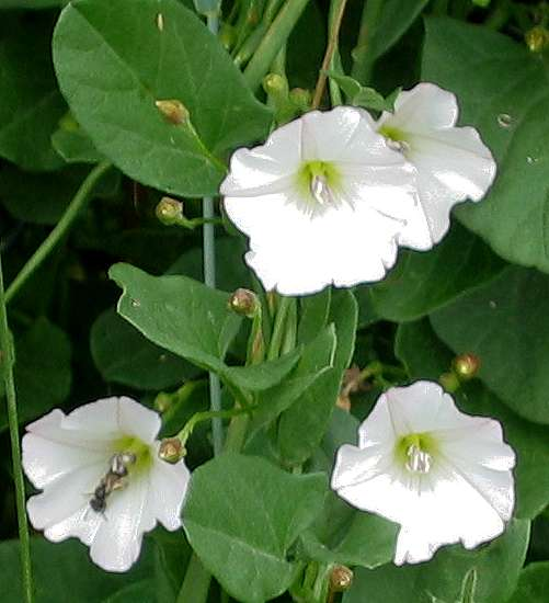 Ackerwinden (Convolvulus arvensis) Fotografiert von Mussklprozz am 19. Juni 2004